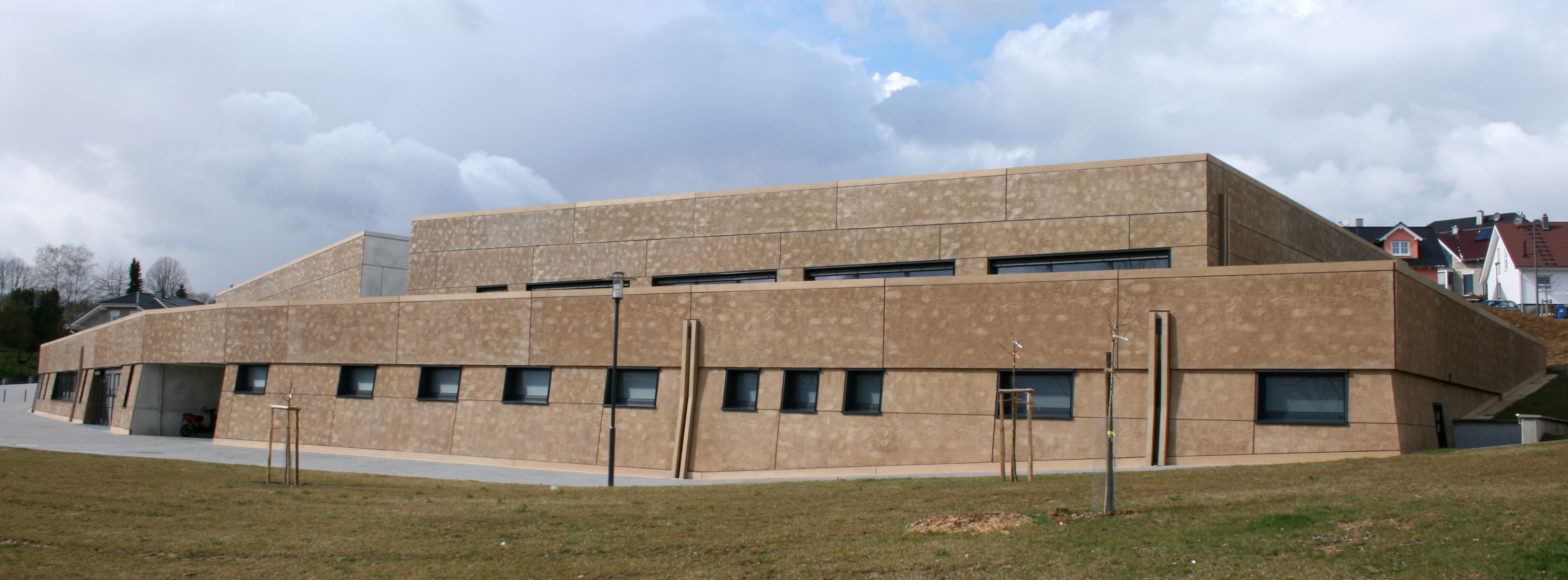 Mehrzweckhalle Niederbrechen, Deutschland